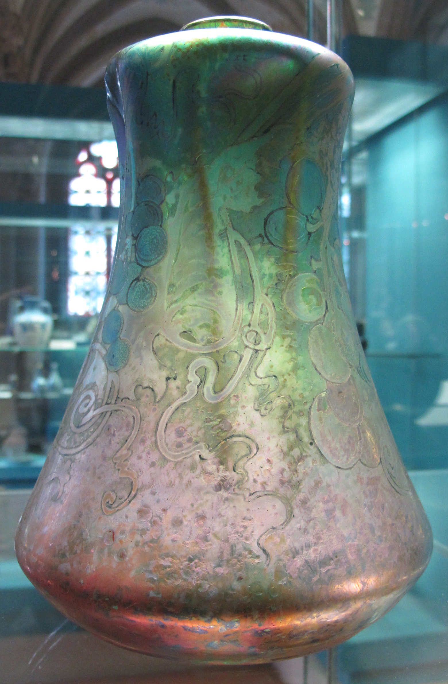 Clément massier, vaso, 1895-99